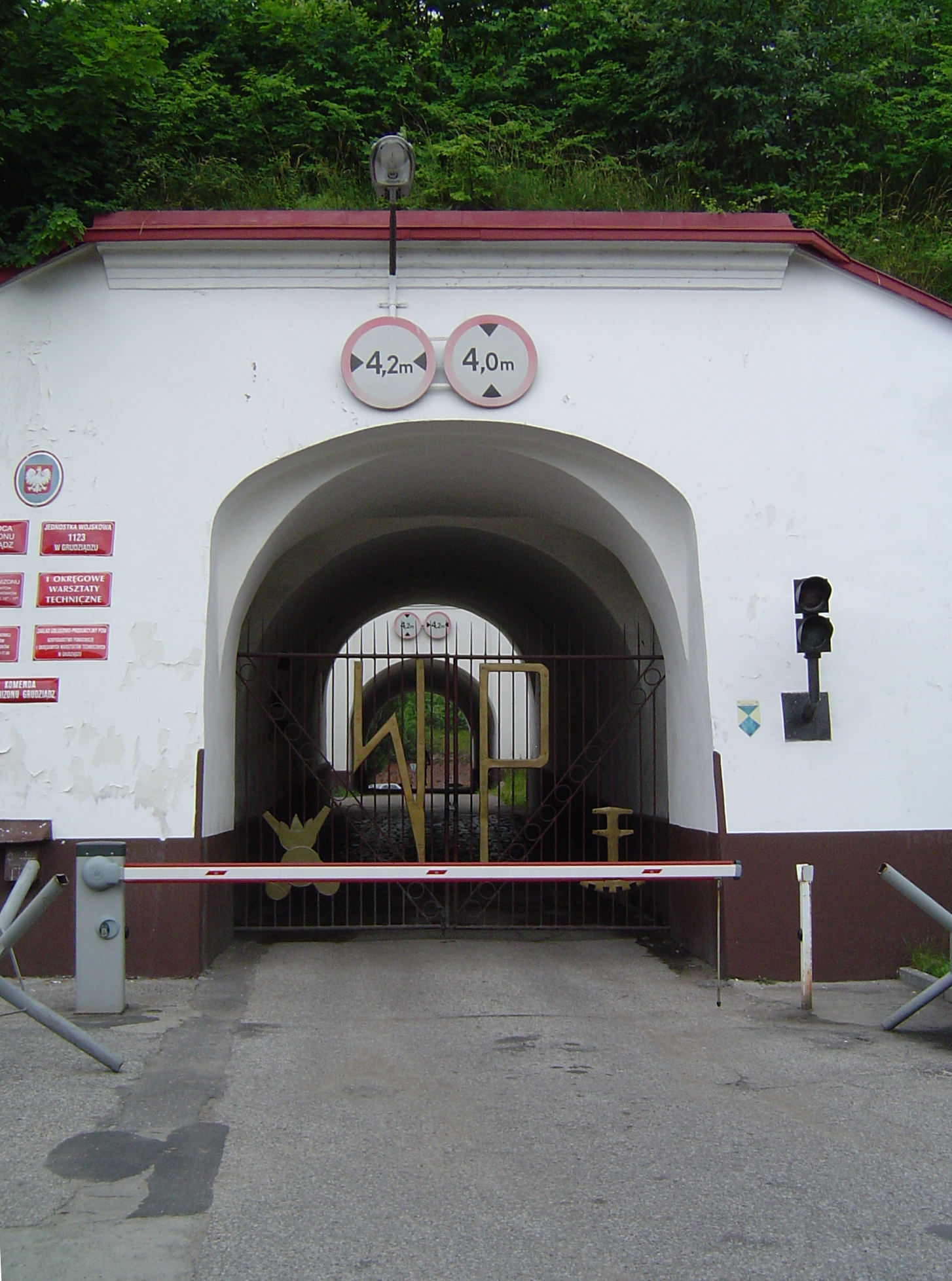 Grudziądz - Twierdza Grudziądz, brama cytedeli (zabytek nr 597)